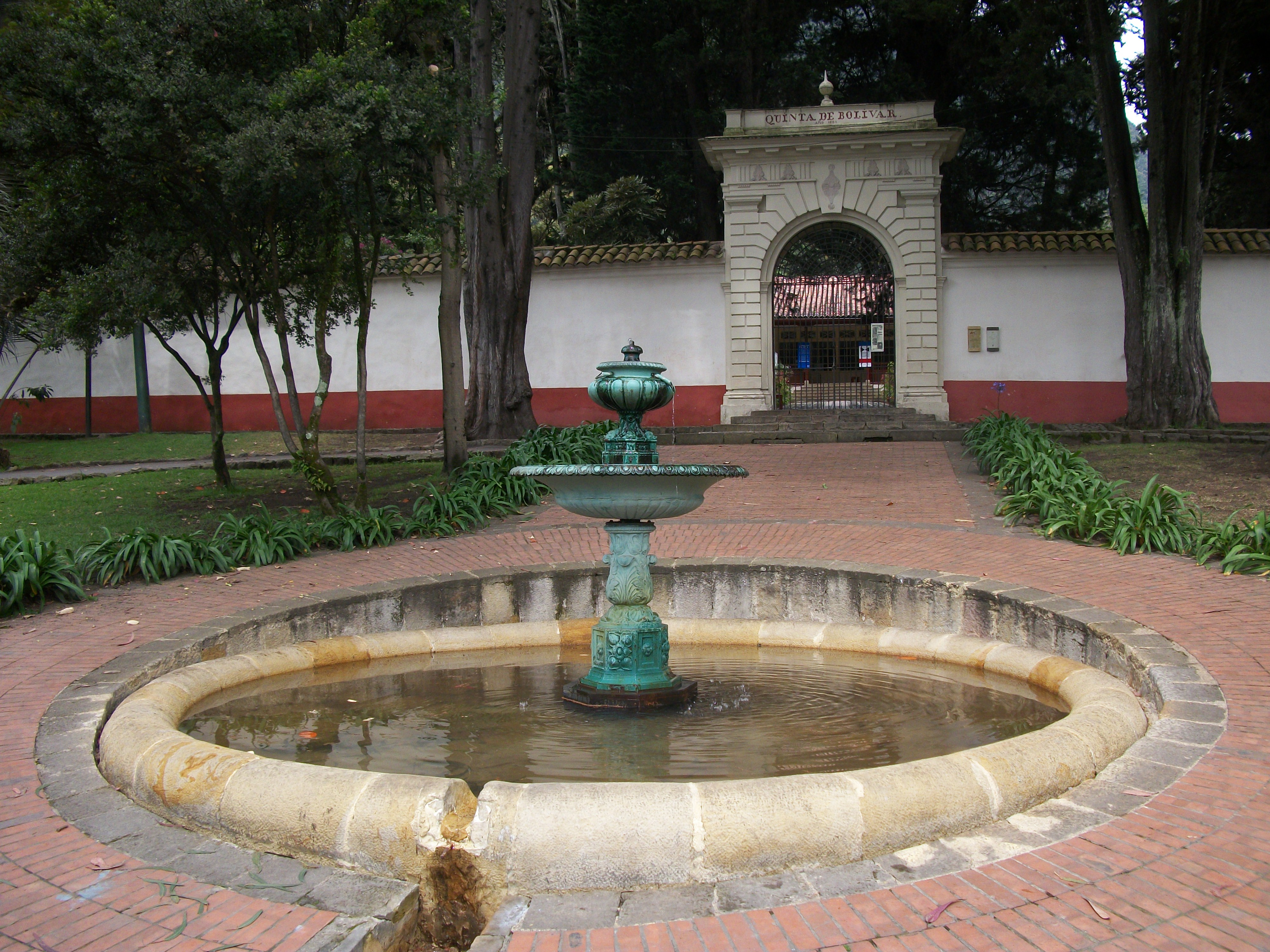 Entrada de la Quinta de Bolívar.